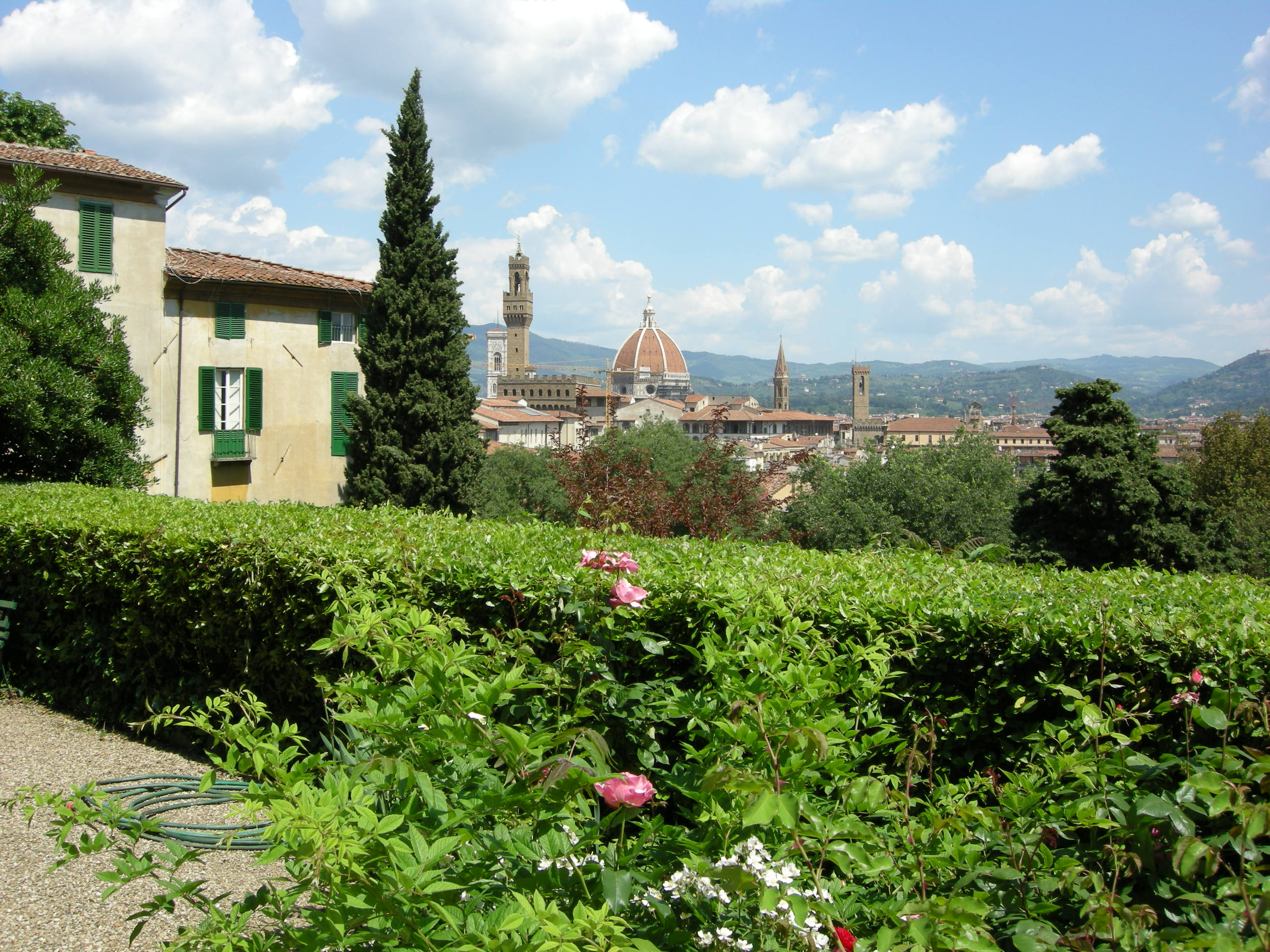 Giardino giuliani, metà superiore 11 view